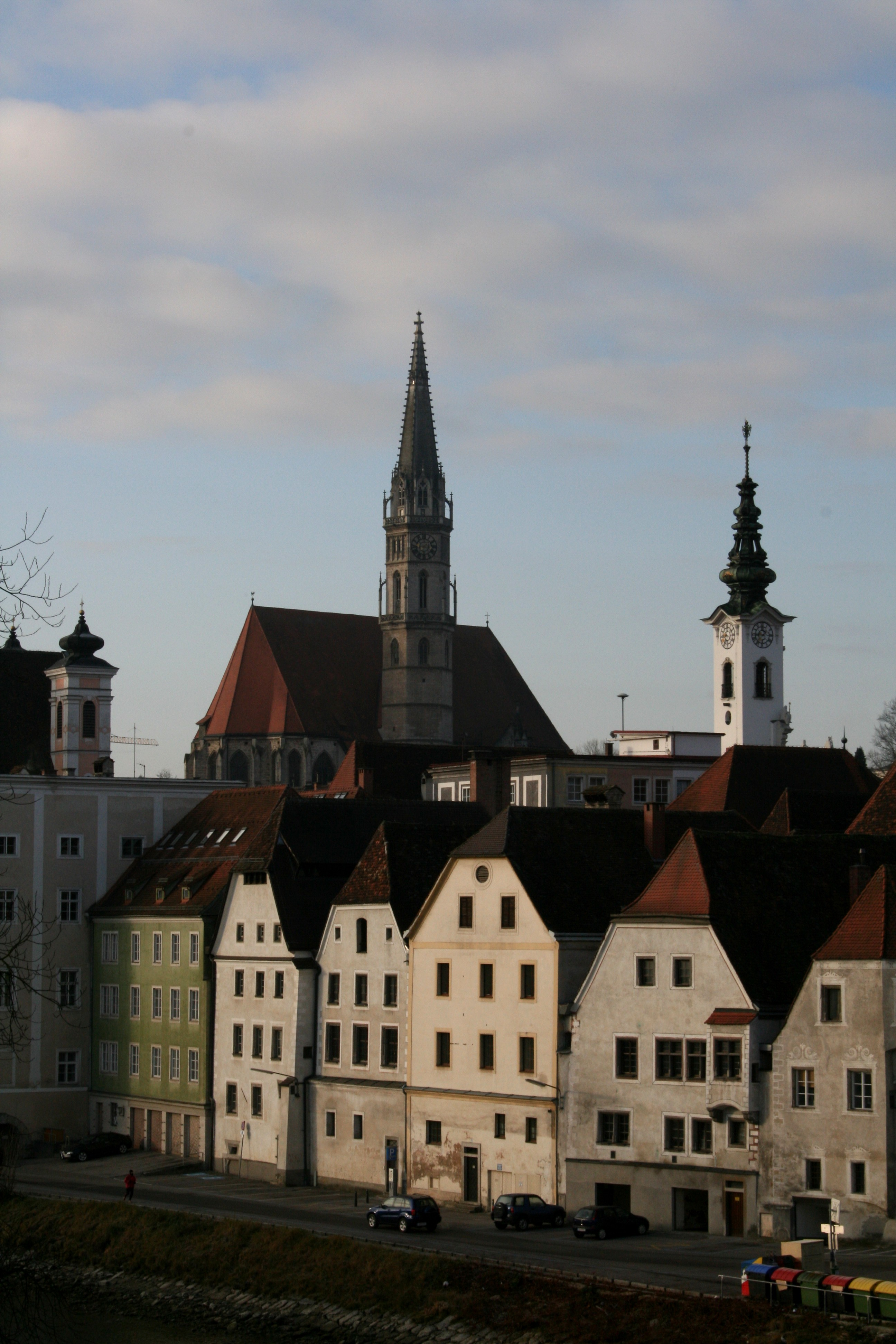 Steyr (Austria): Stadtpfarrkirche, Rathaus, Ennskai